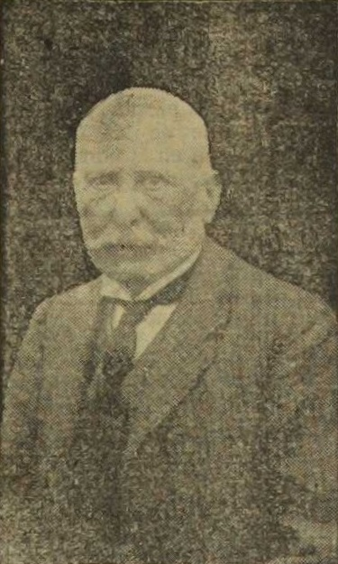 Juan Bautista Bellveser Gorina